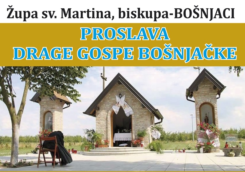 Svetište danas